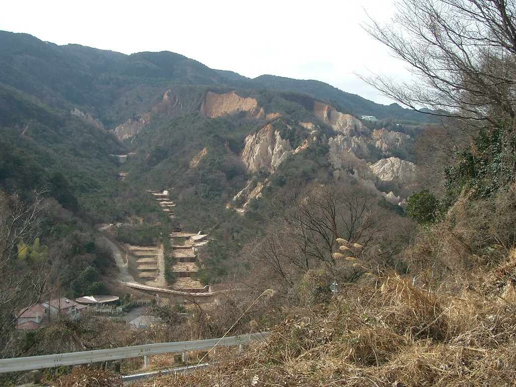 座頭谷（左）と蓬莱峡